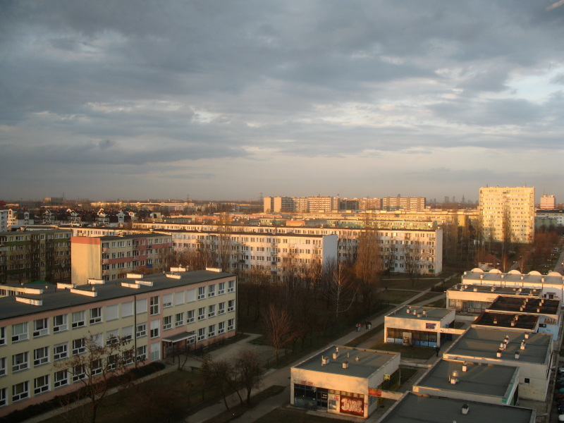 Dzielnica Ursus (Warszawa)